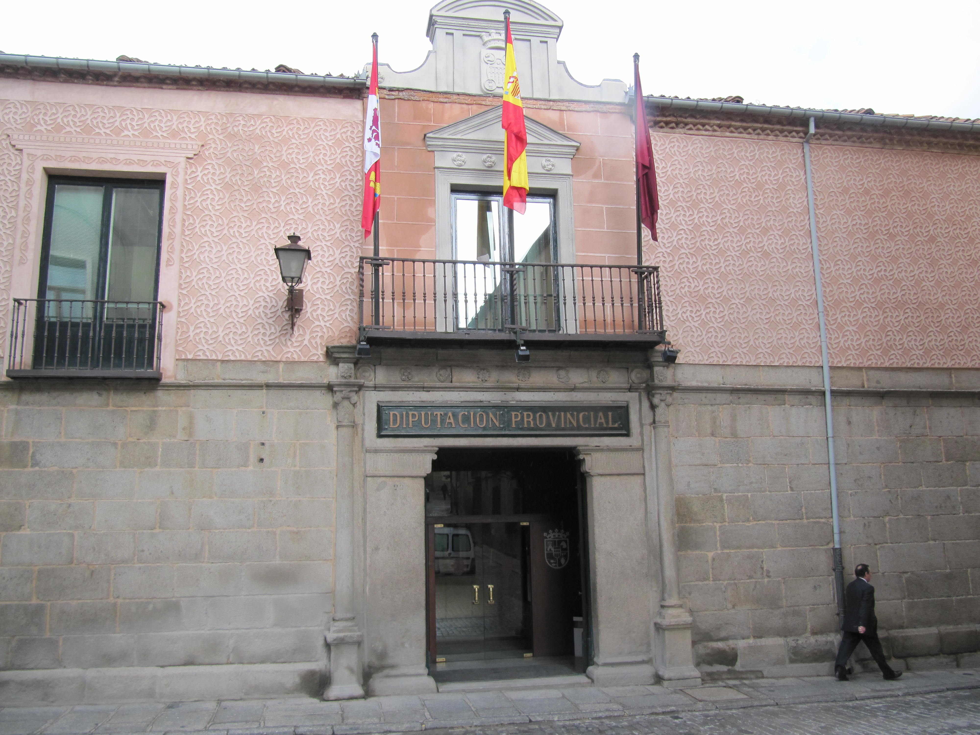 Palacio de la Exma. Diputación Provincial de Segovia.